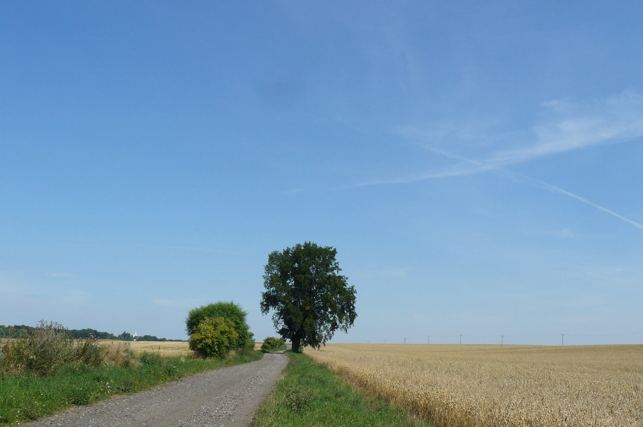 Krajobraz gminy Warnice pomiędzy Koszewem, a Wierzbnem.